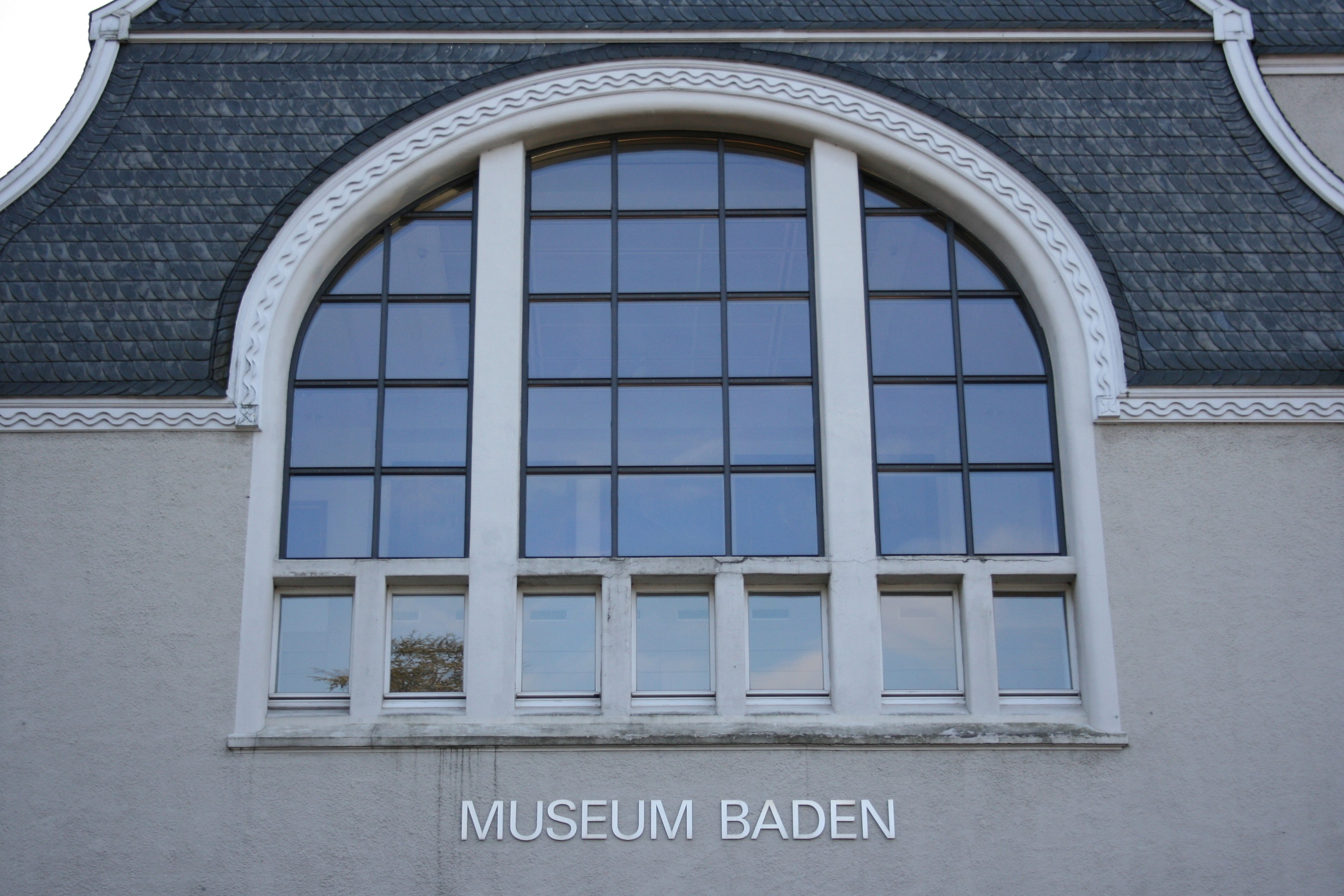 Museum Baden in Solingen-Gräfrath